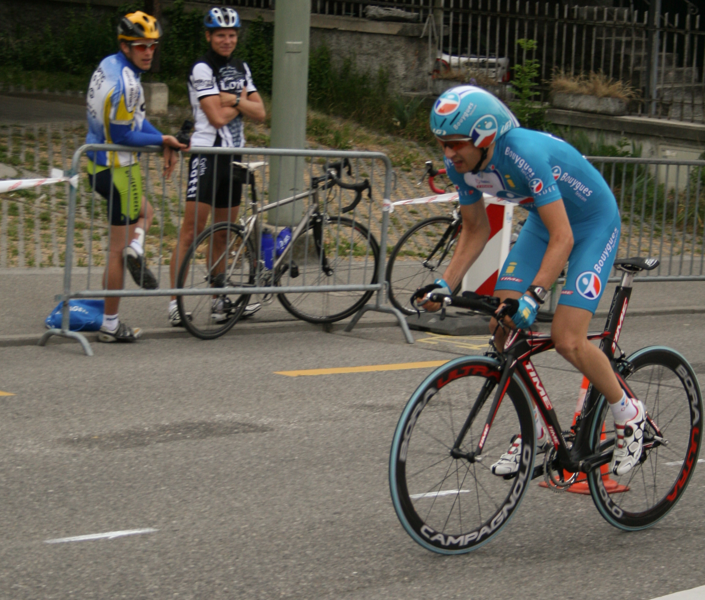 Johann Tschopp prologue du Tour de Romandie 2007